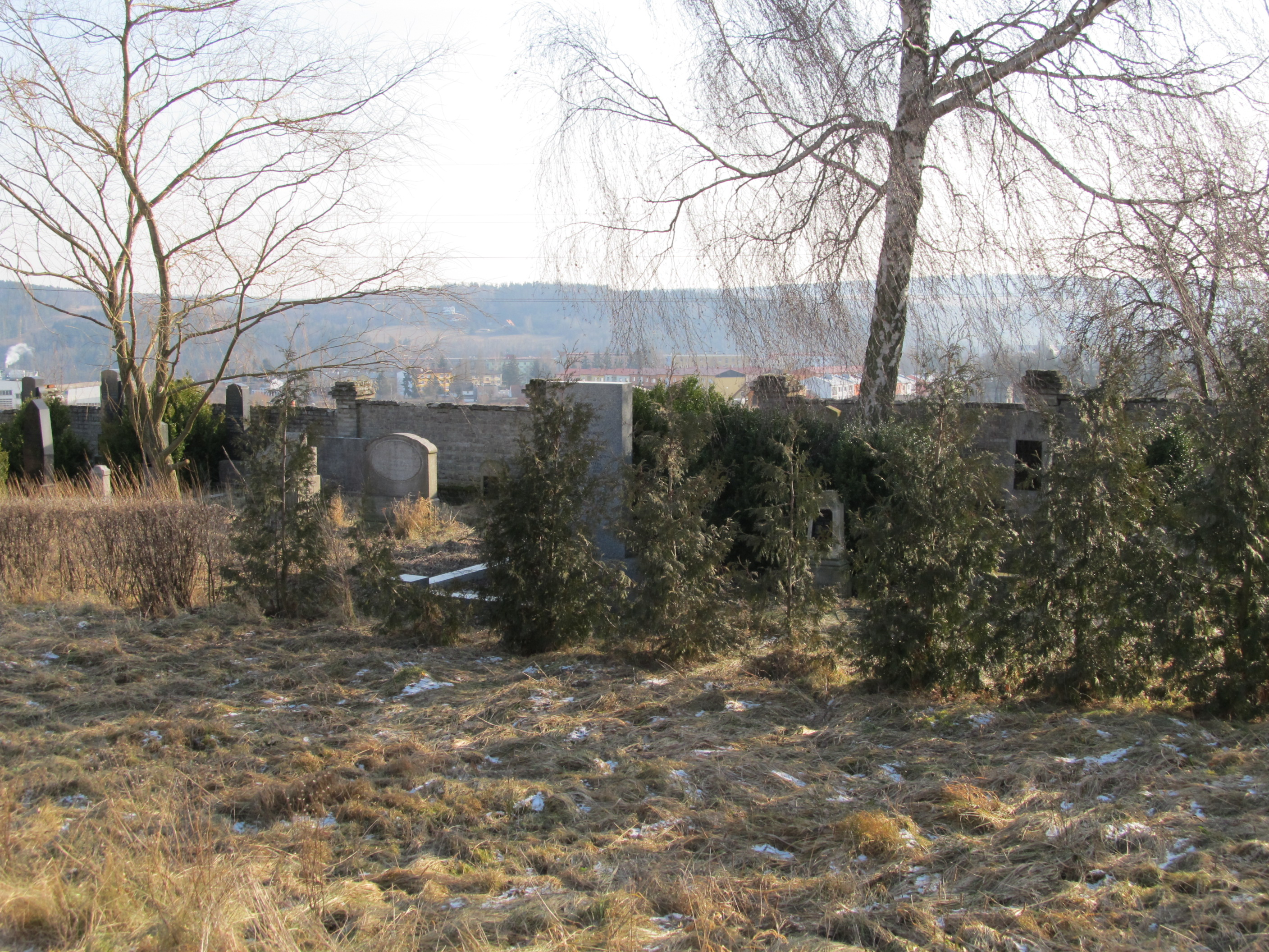 Stříbro 01 ŽH